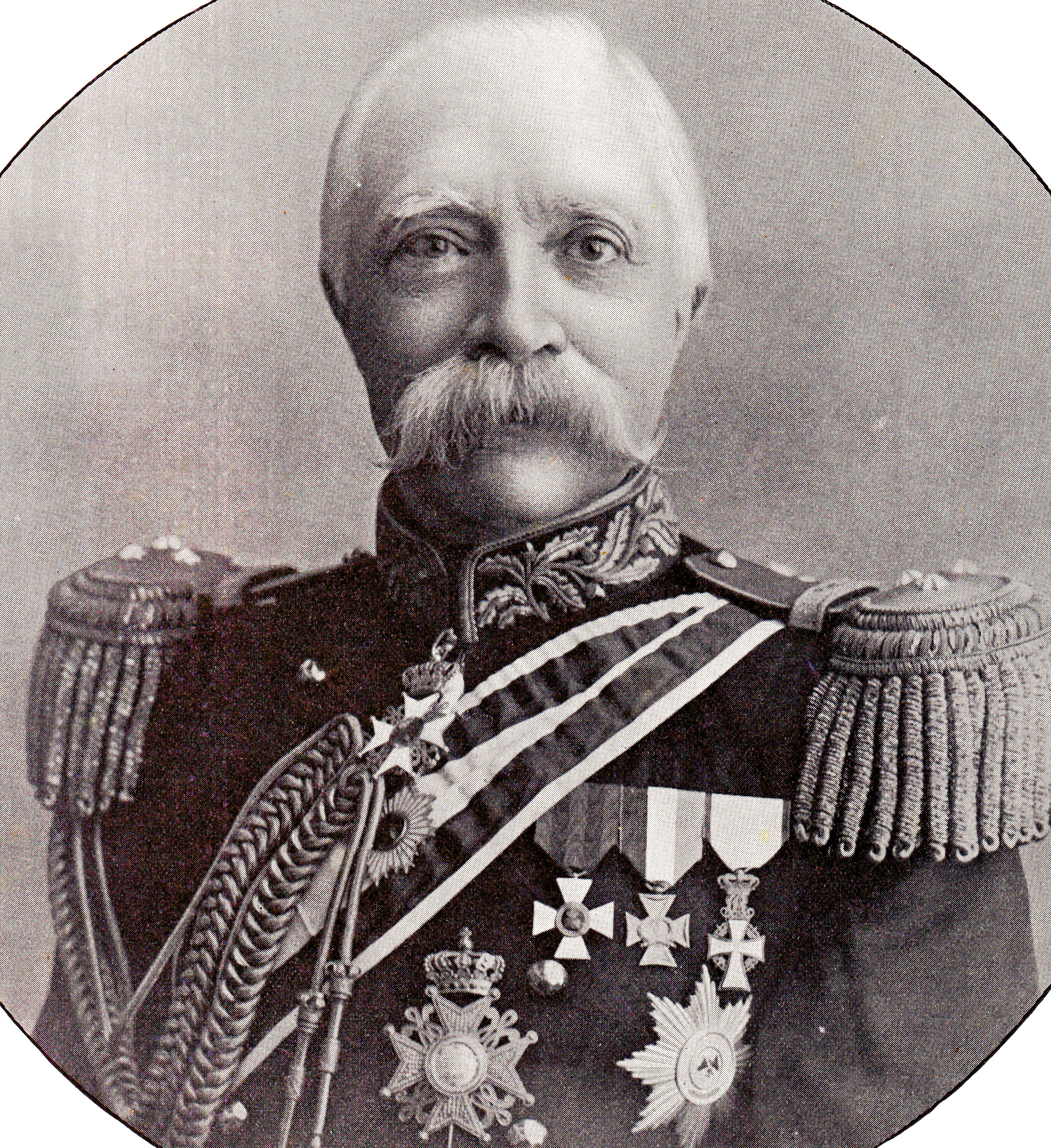 Luitenant generaal JW Bergansius